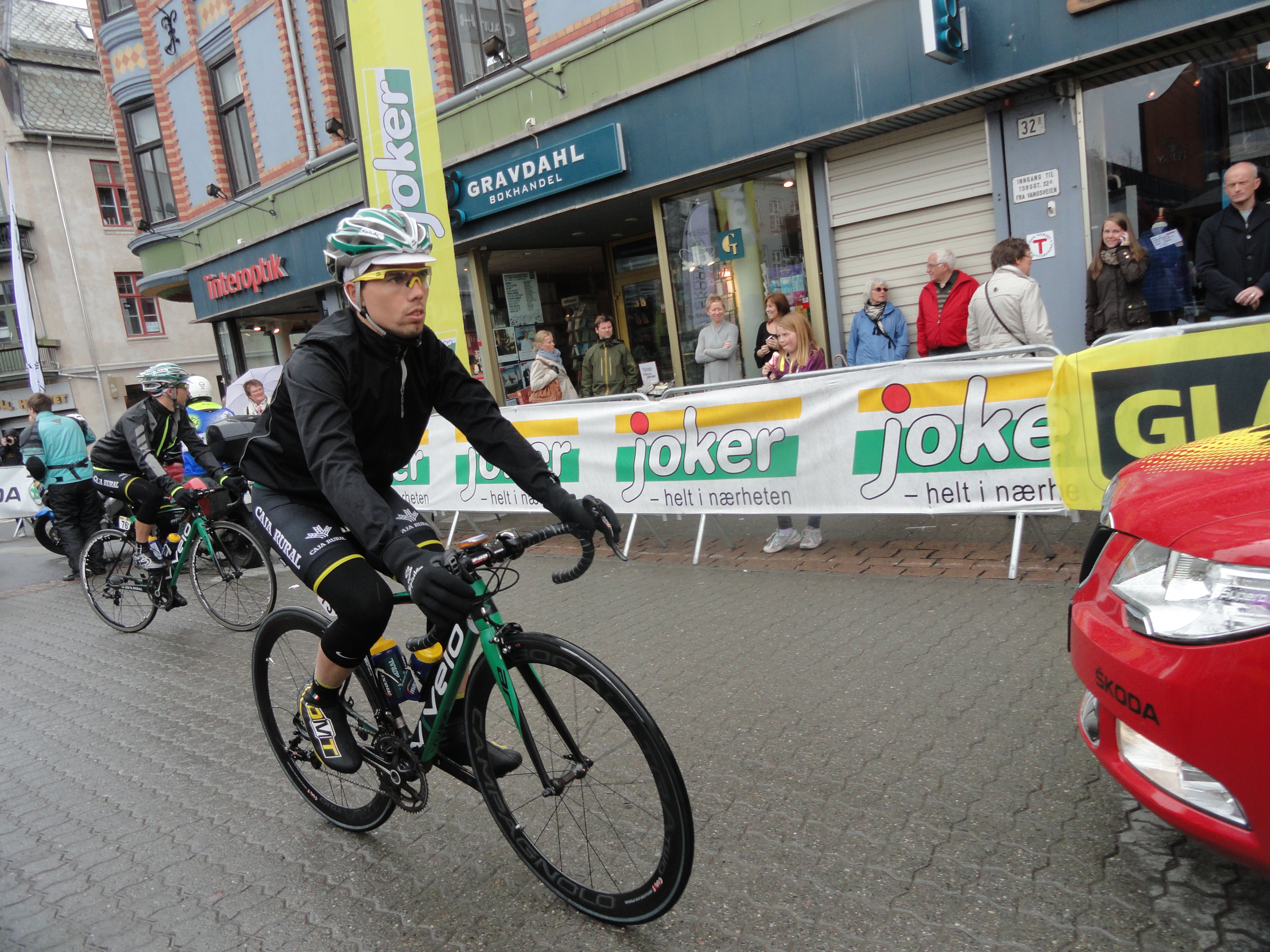 André Cardoso (Caja Rural) som vant klatretrøya i Glava Tour 2012.